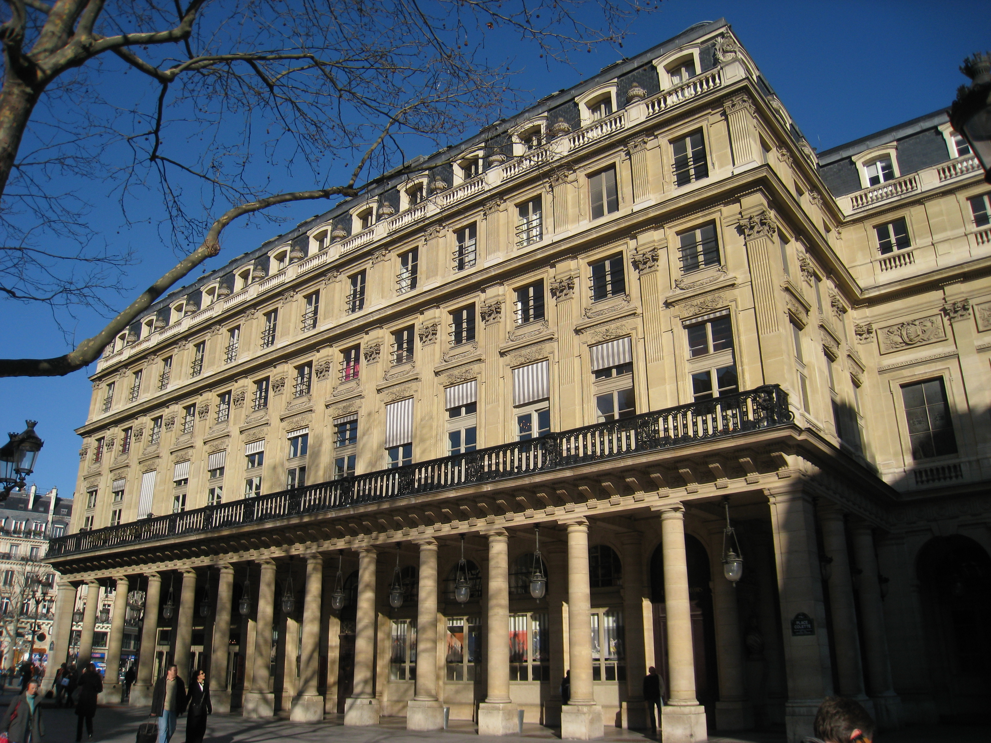 Comédie-Française, Paris, France - west facade.